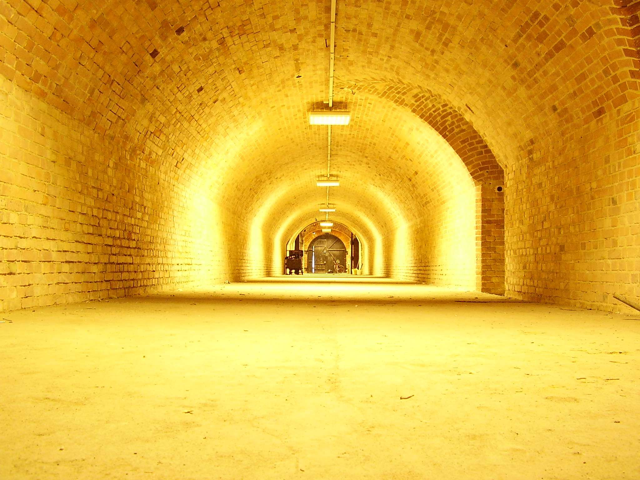 Fort 2a